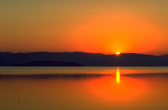 Umbria (Italy) - Il lago Trasimeno